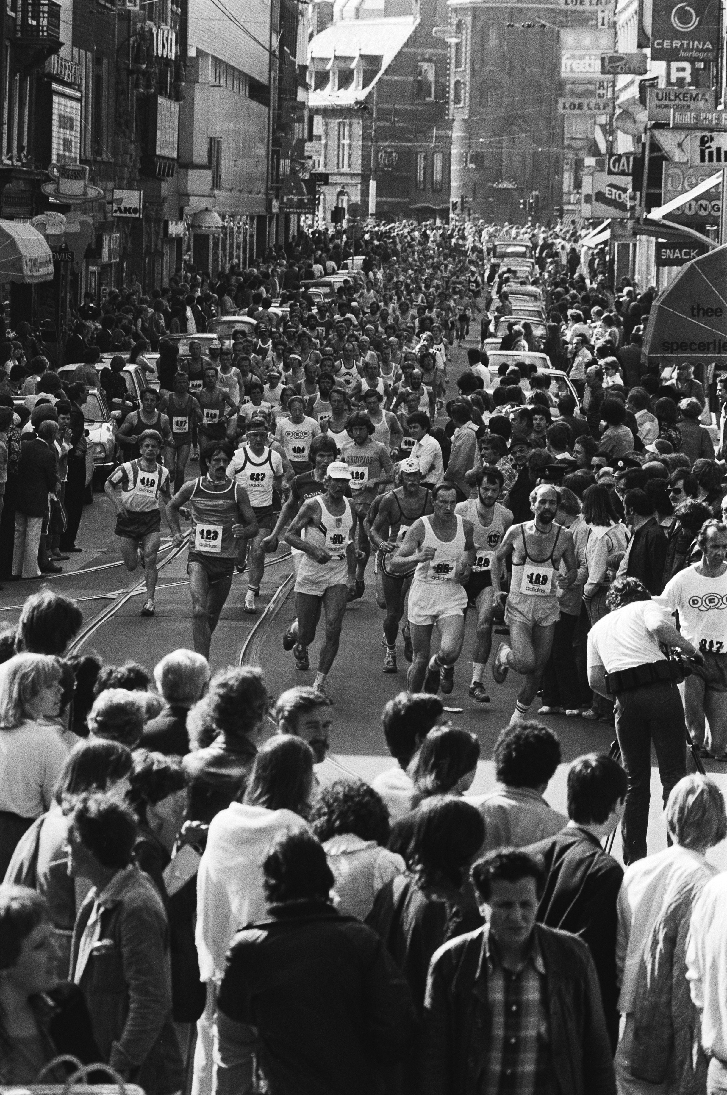 Collectie / Archief : Fotocollectie Anefo Reportage / Serie : Internationale Marathon in Amsterdam Beschrijving : marathons, steden Datum : 18 mei 1979 Locatie : Amsterdam, Noord-Holland Trefwoorden : marathons, steden Instellingsnaam : Munttoren Fotograaf : Suyk, Koen / Anefo Auteursrechthebbende : Nationaal Archief Materiaalsoort : Negatief (zwart/wit) Nummer archiefinventaris : bekijk toegang 2.24.01.05 Bestanddeelnummer : 930-2753